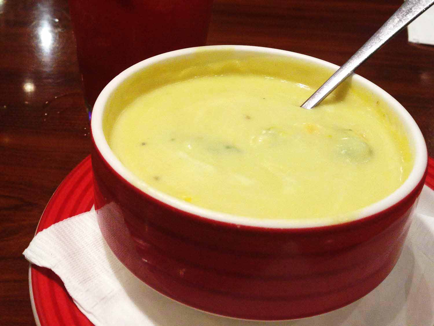 [TGIF]